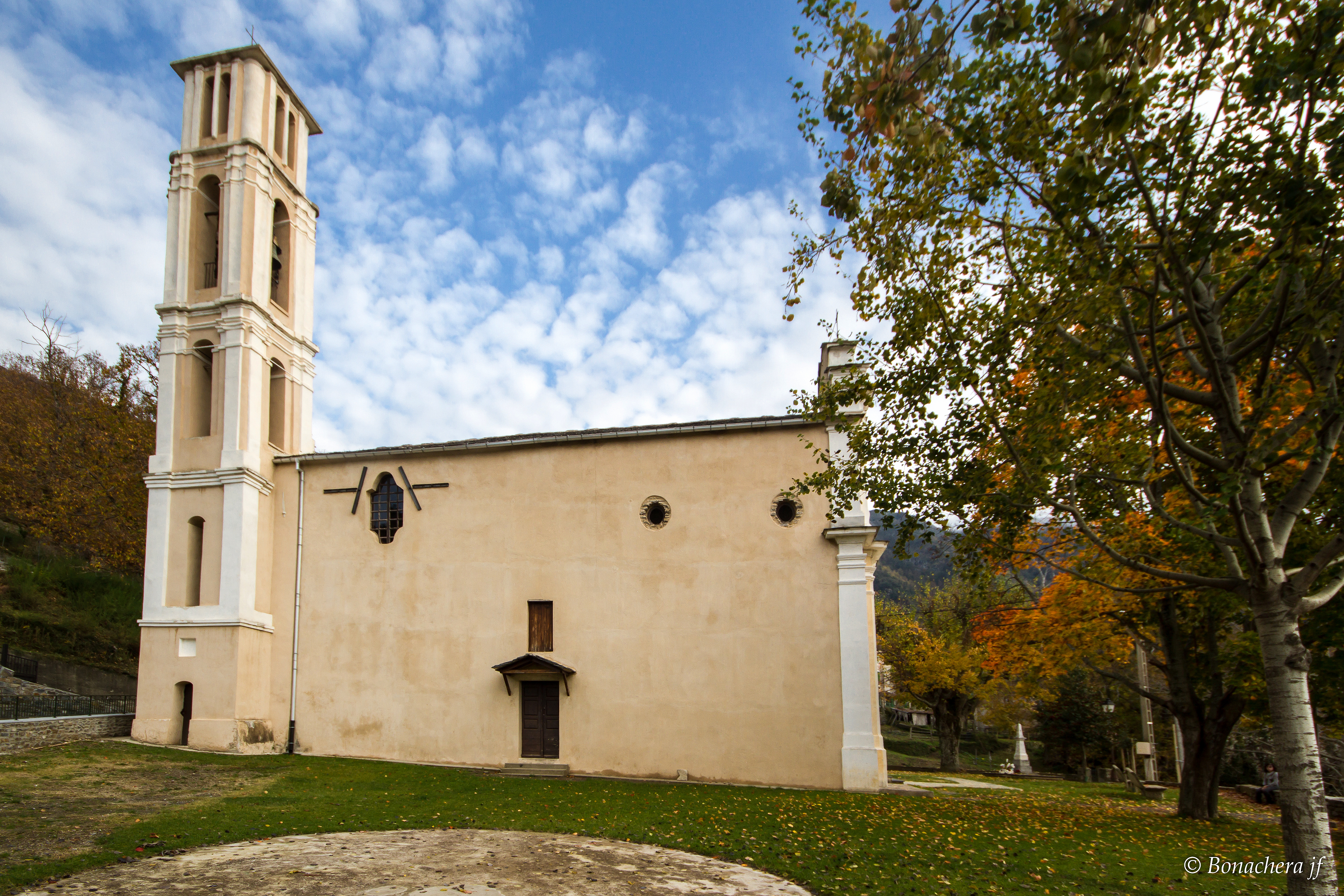 Felce, Castagniccia (Haute-Corse) - L'église paroissiale Saint-Côme-et-Saint-Damien, vue latérale